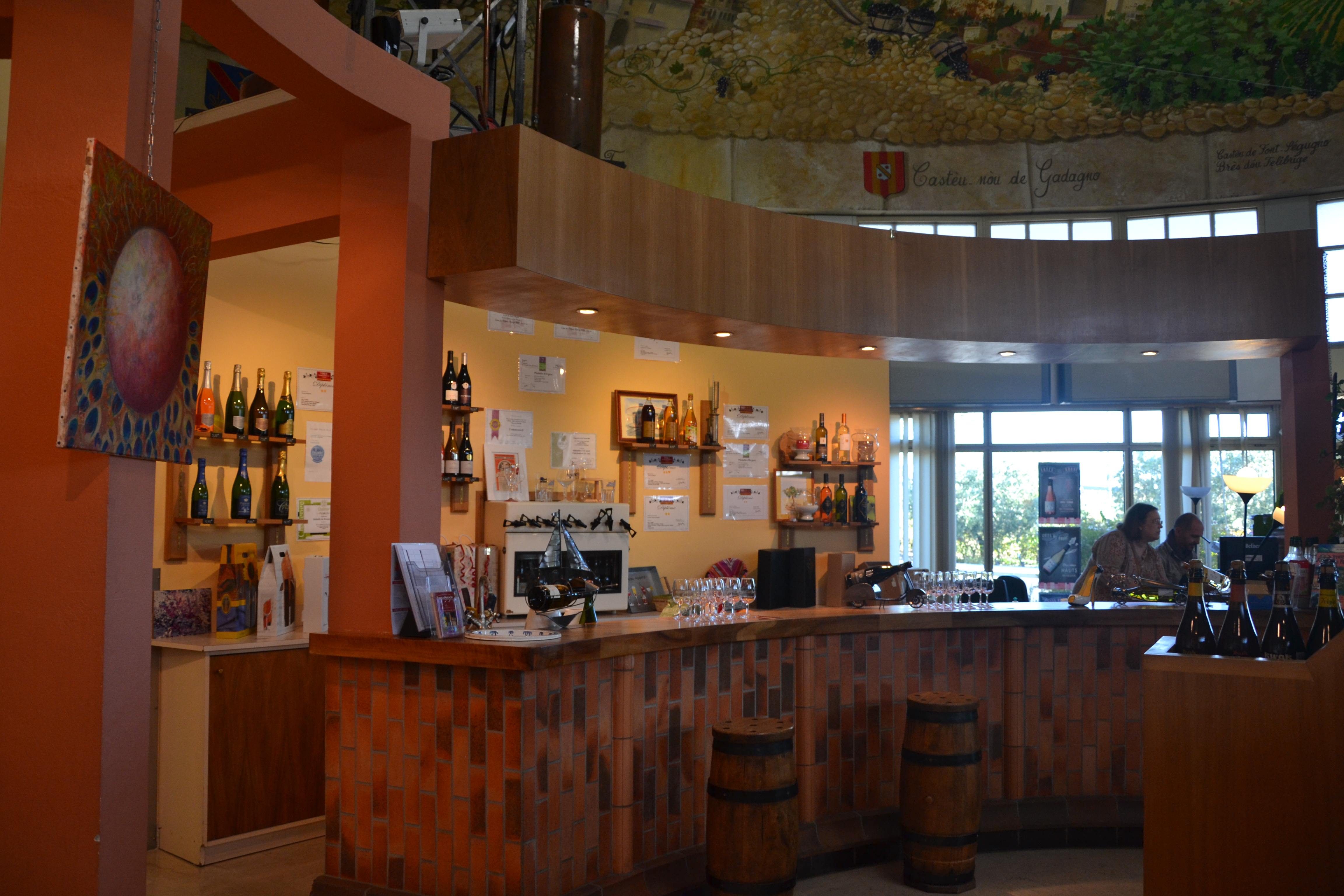 Cave coopérative viticole de Morières-lès-Avignon : dégustation